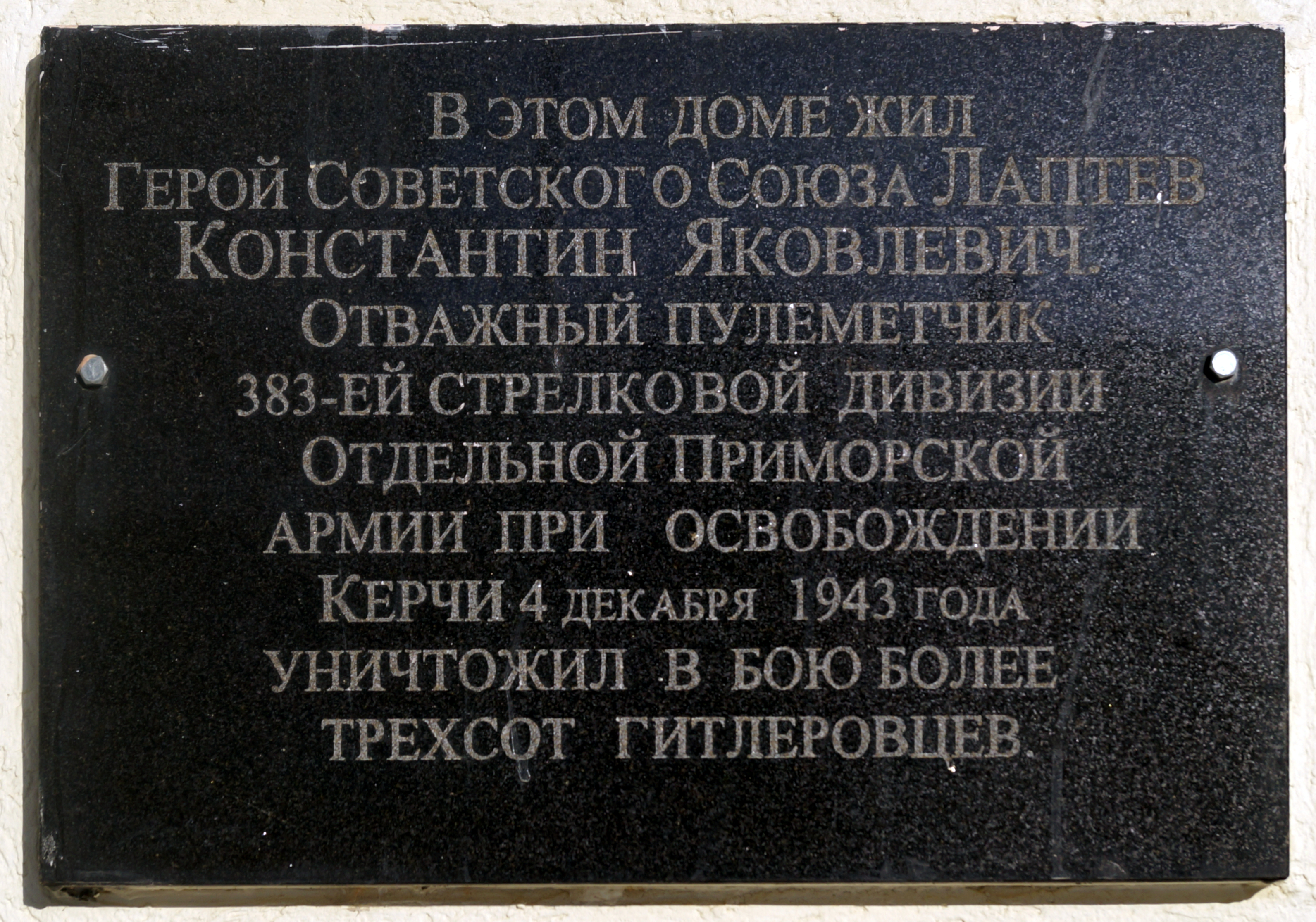 Памятная доска на доме, в котором жил Герой Советского Союза К. Я. Лаптев (город Ставрополь, улица Морозова № 7А). Установлена решением ГИК от 24.03.1969 № 224. Находится на местном учёте